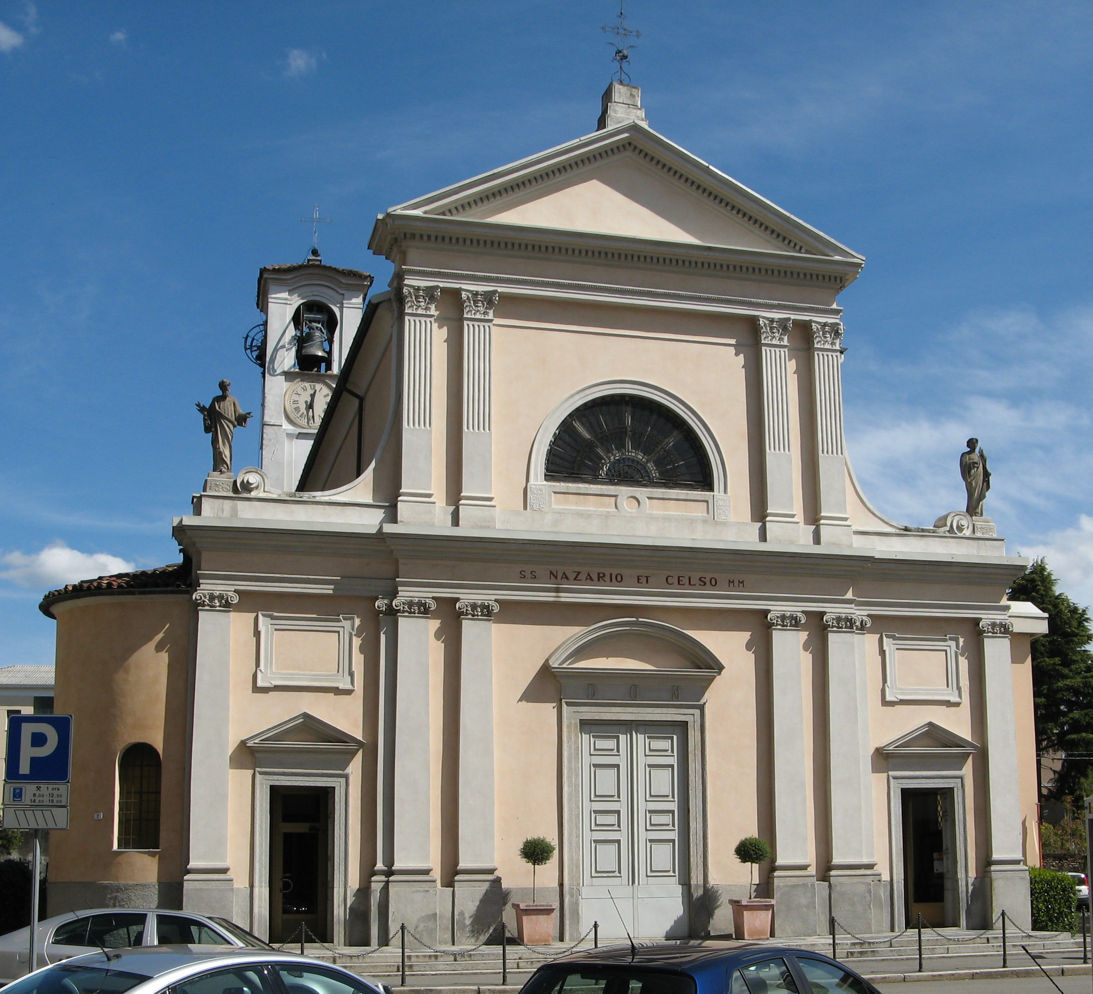 Chiesa dei SS Nazaro e Celso Gallarate (Italy)